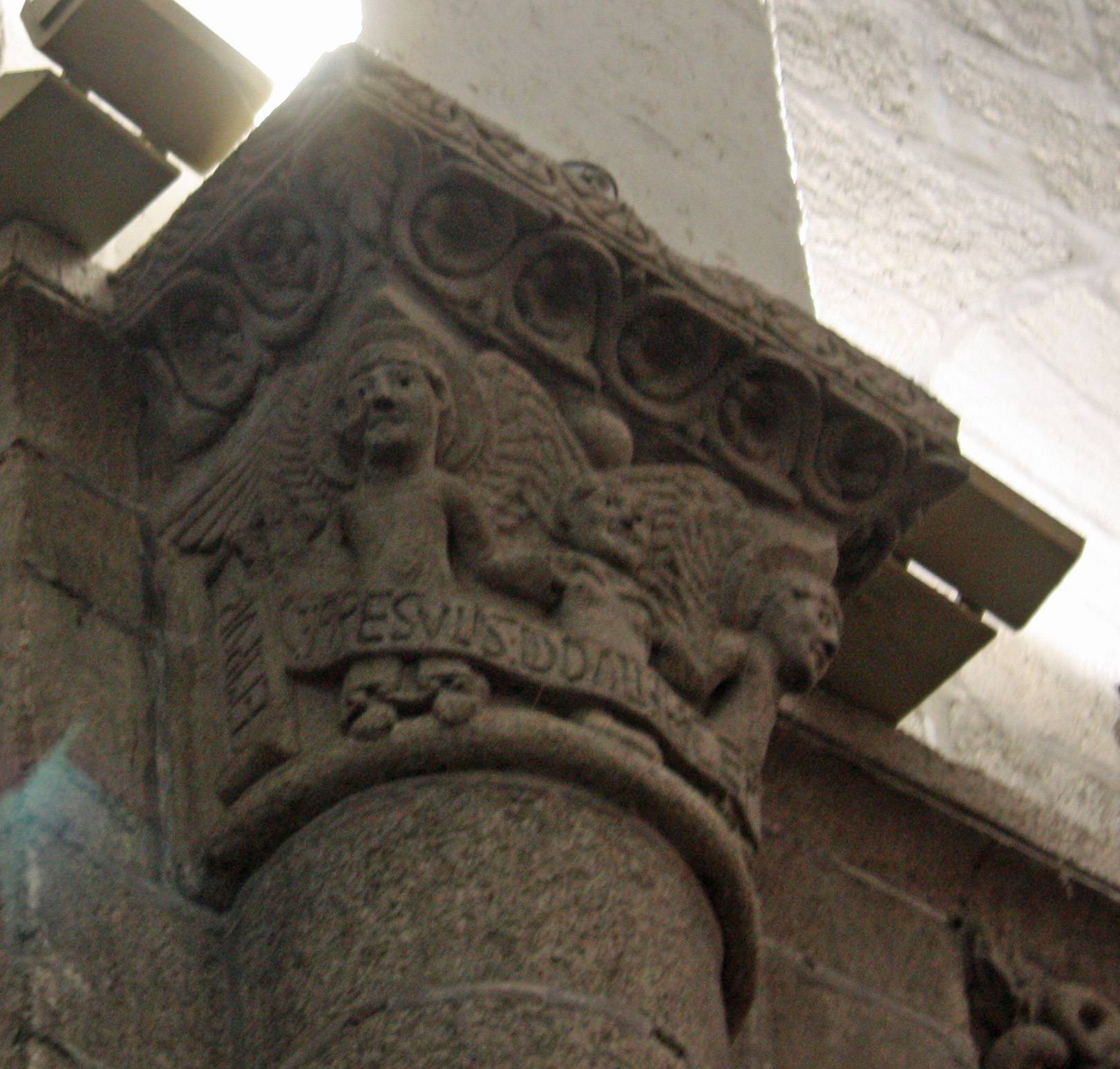 Capitel fundacional da Catedral de Santiago de Compostela ("En tempo do prelado Diego [1071/1075 - 1088] comezouse esta obra")